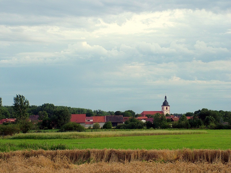 Haßleben in Thüringen im Sommer 2009 nach dem Abschluß der Kirchturmsanierung, aufgenommen vom "Haßlebener Rieth" aus